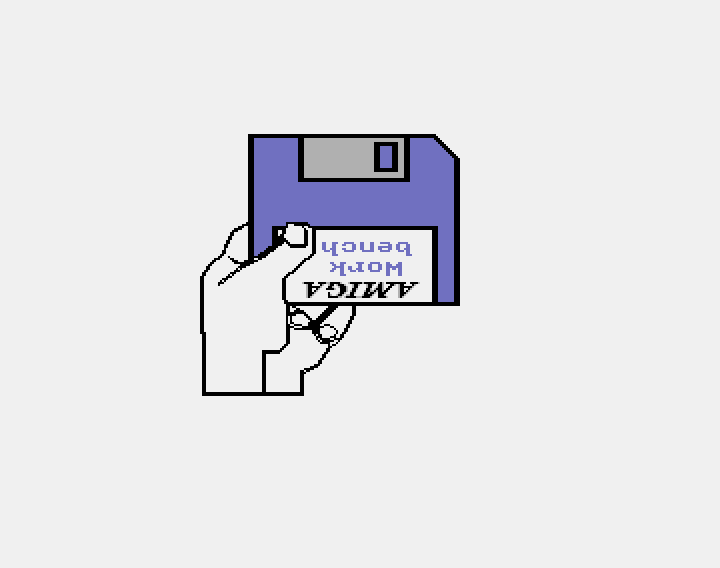 Image du Kickstart 1.1 de l'Amiga